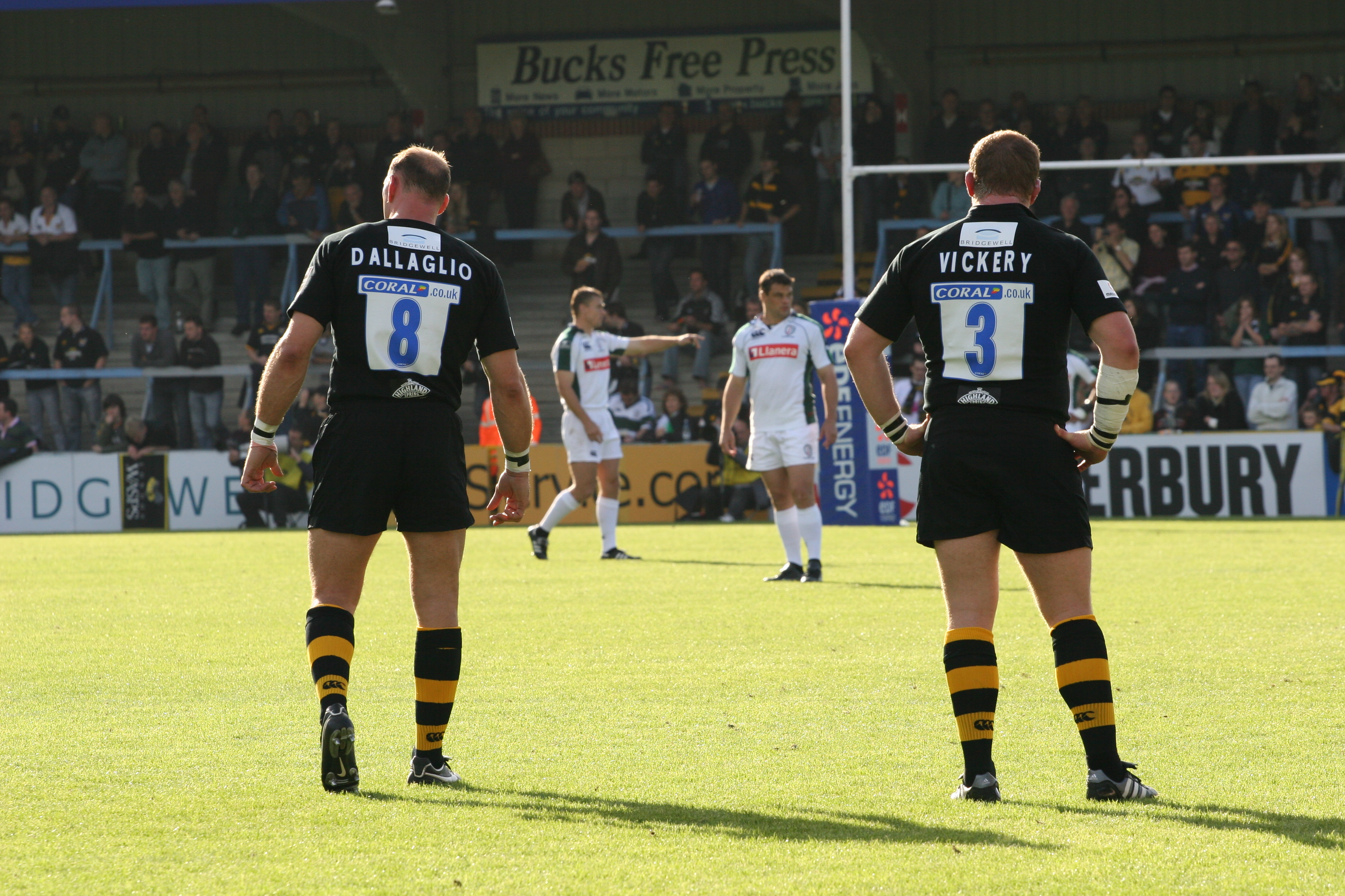 Lawrence Dallaglio 3ème ligne et Phil Vickery pilier des London Wasps